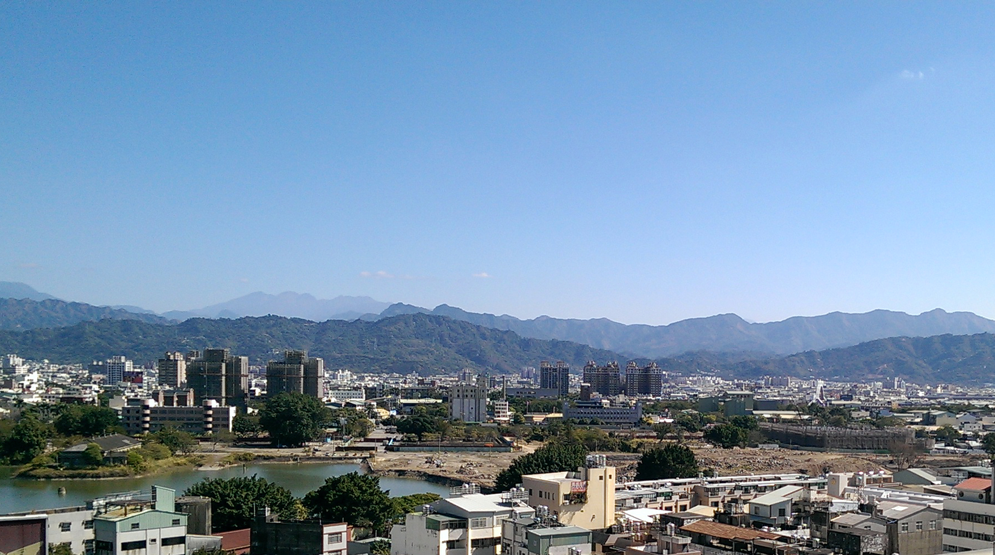 俯瞰台中盆地東緣（圖中左側為臺中糖廠房，右為建國市場新建工程）